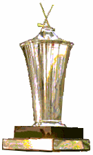 Le Mat-pokalen